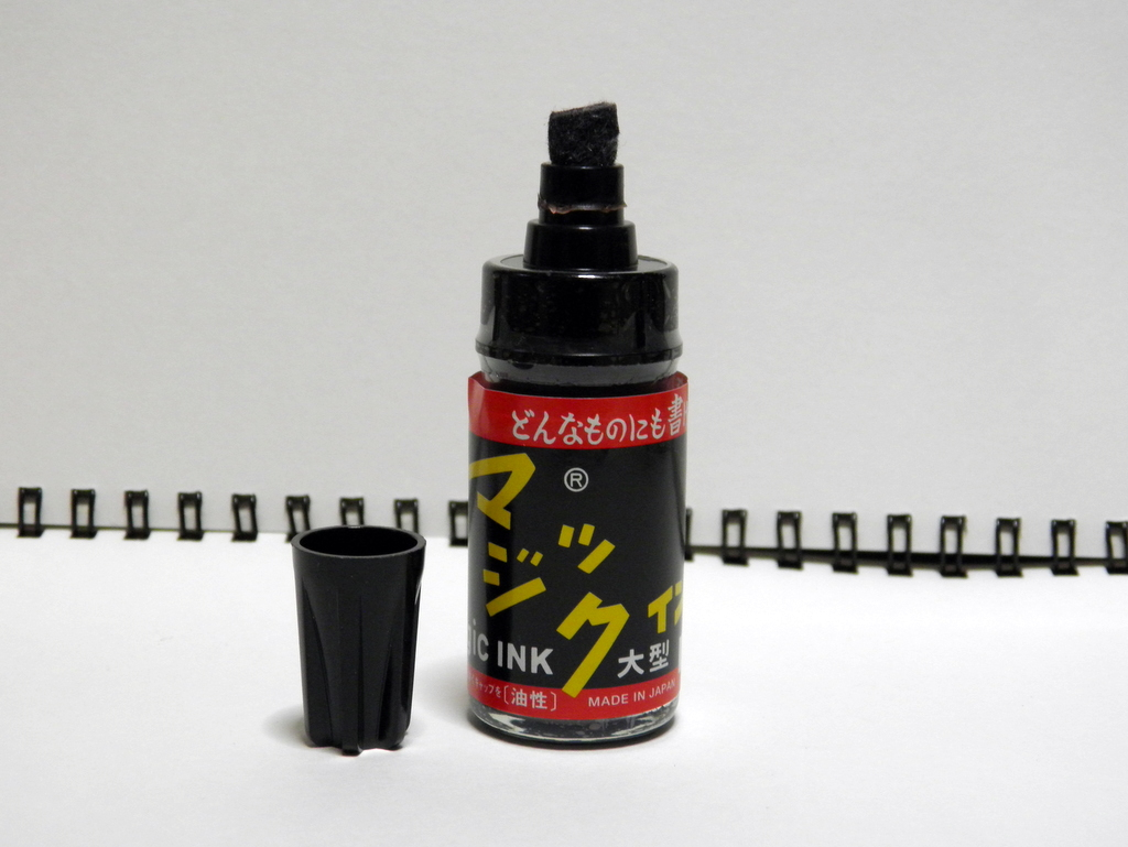 寺西化学工業株式会社「マジックインキ」黒色。キャップを外した状態。